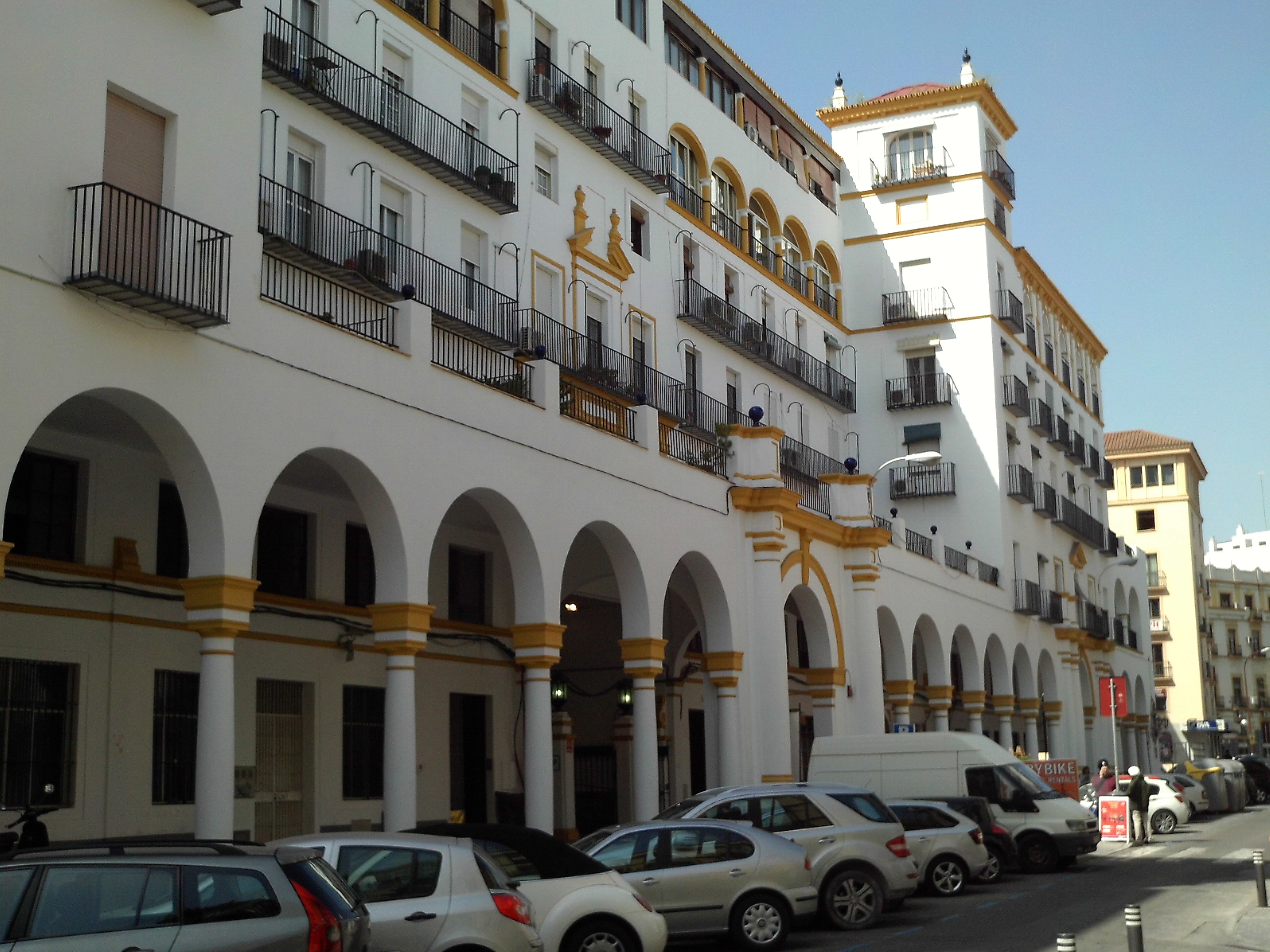 Mercado del Arenal. Sevilla, Andalucía, España.